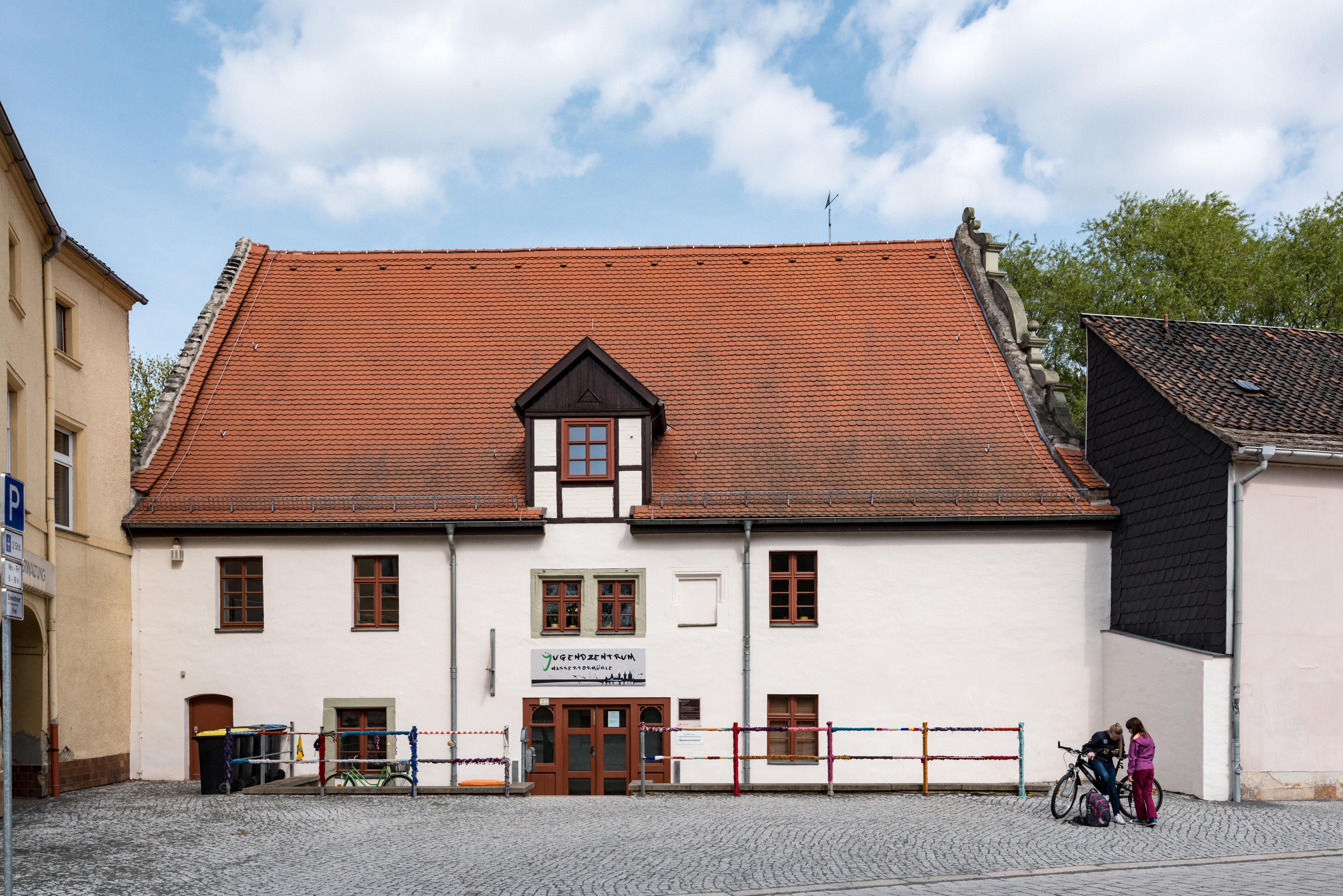 Aschersleben, Über dem Wasser 22